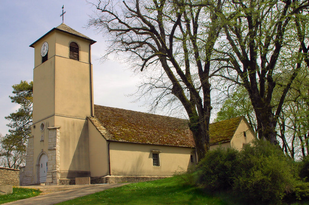 Eglise Saint-Nicolas, à Publy (Jura)